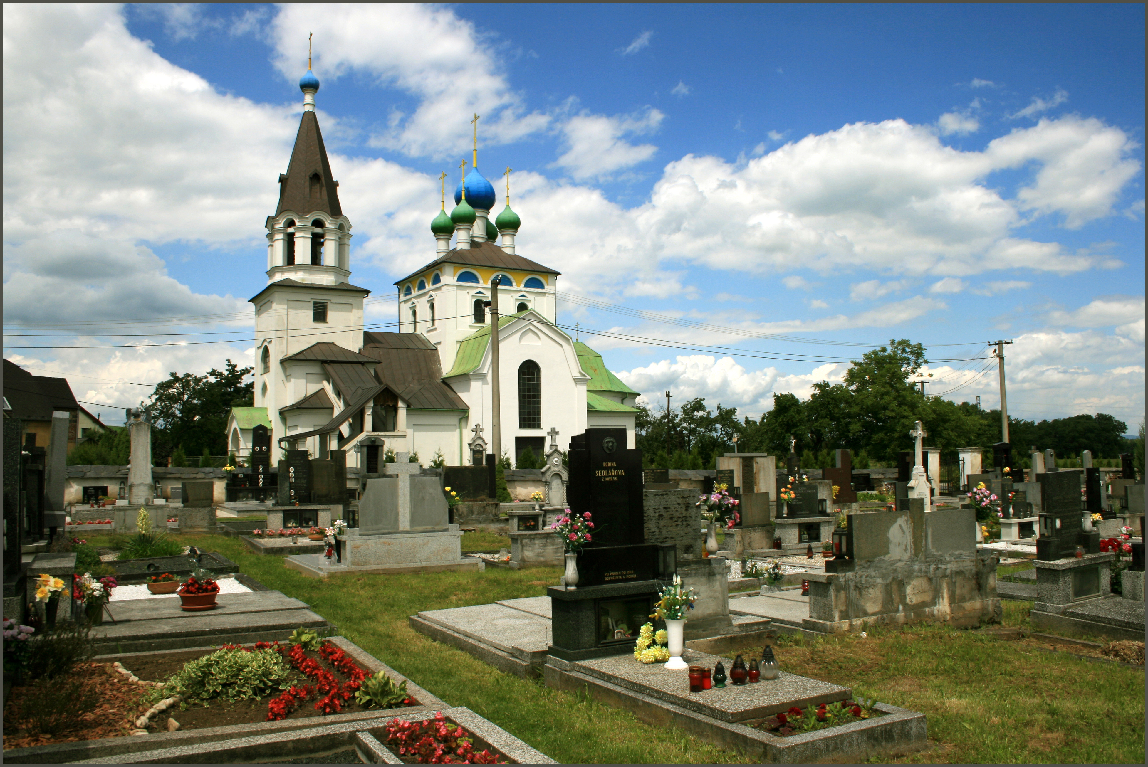 Litovel-Chudobín Orthodox Church